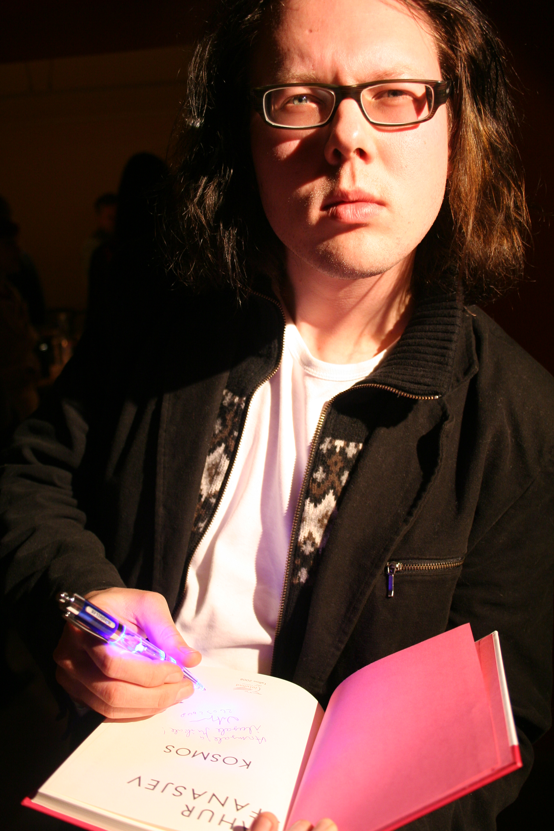 Vahur Afanasjev Tartu Kirjanduse Maja krüptis oma romaani "Kosmos" esitlusel